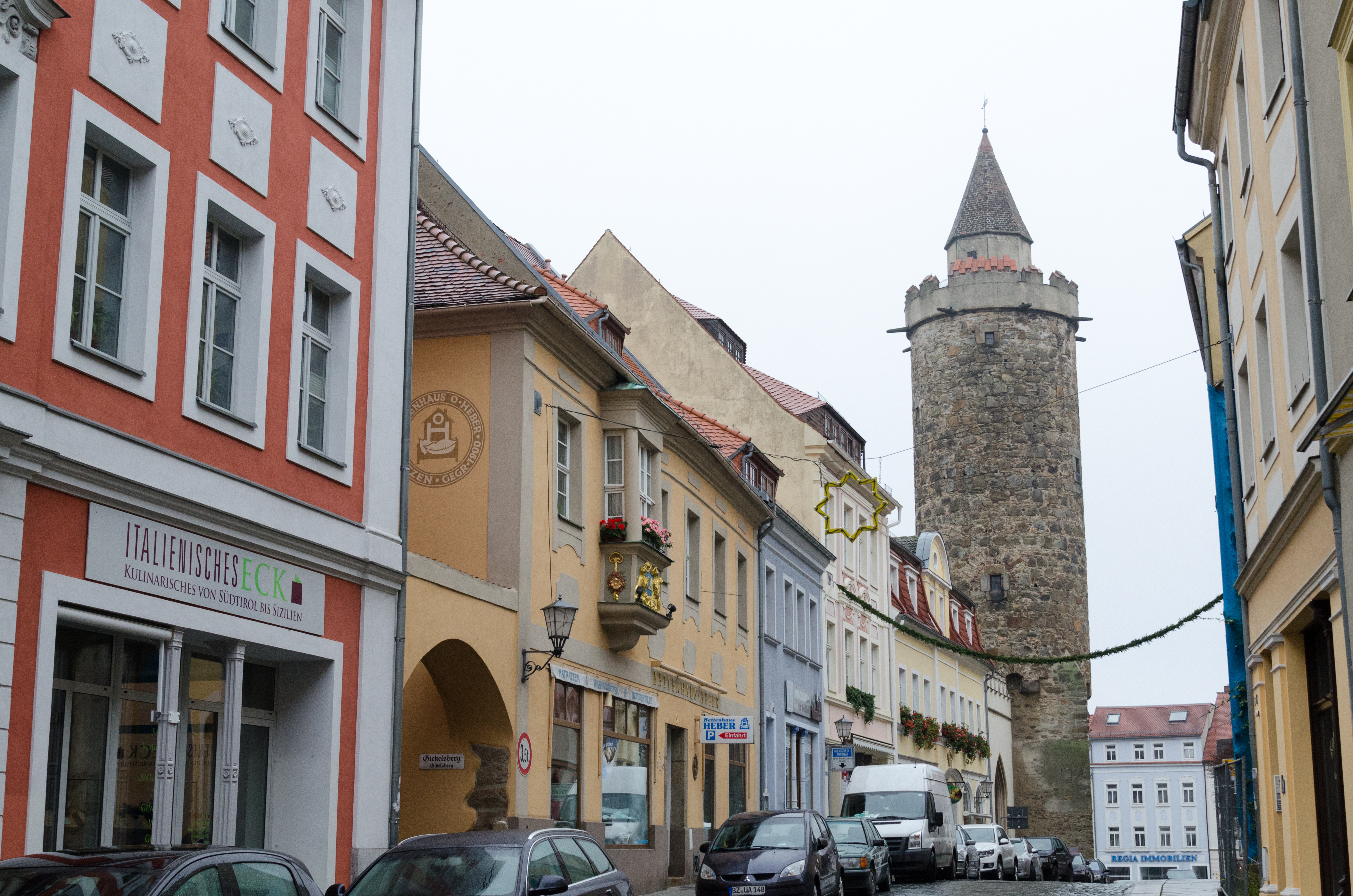 Bautzen, Wendische Straße Nordseite, Wendischer Turm Hornjoserbsce: Budyšin; Serbska wěža a Serbska hasa.